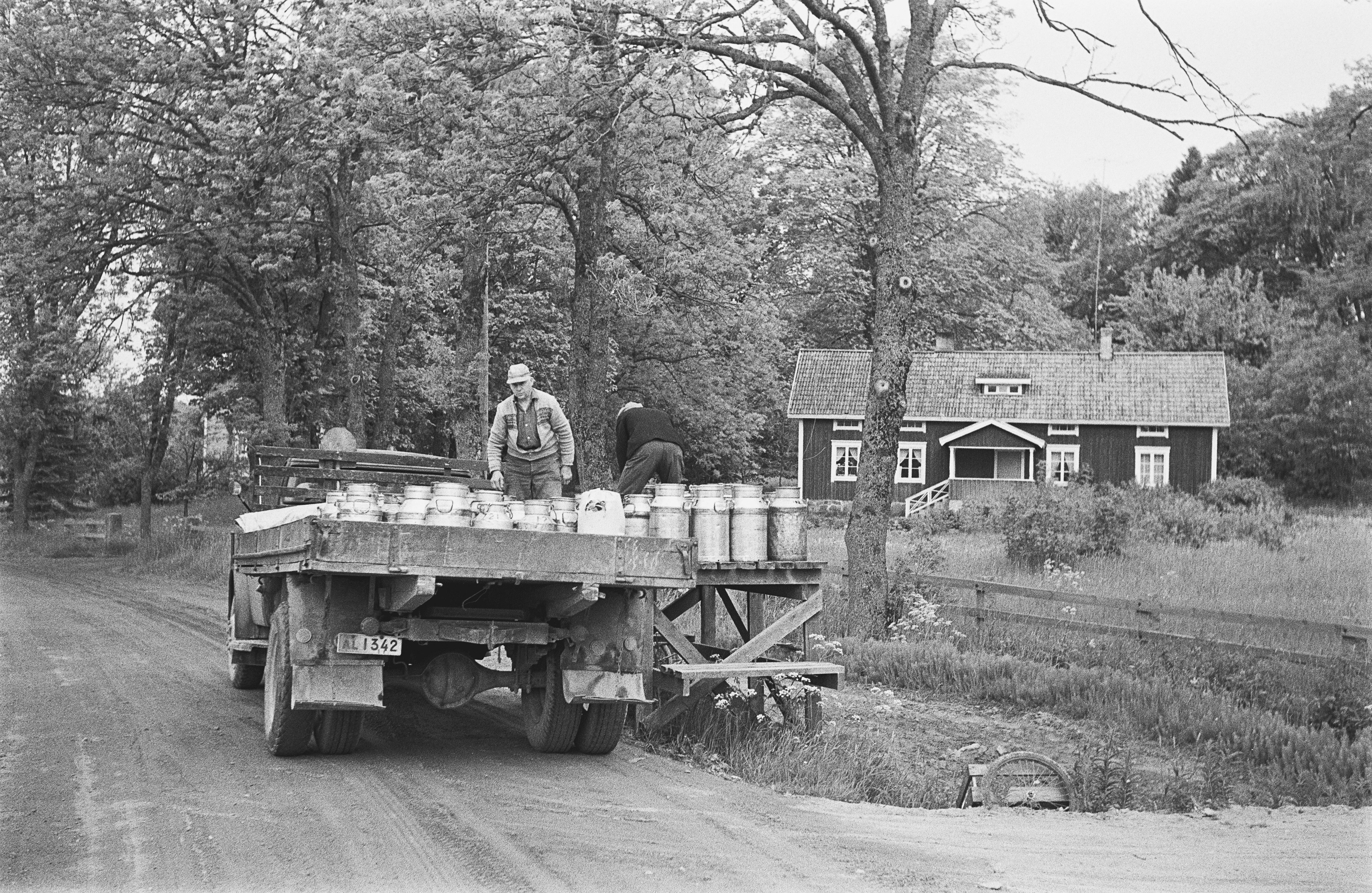 Mjölkkannor lastas vid mjölkbrygga i Pålsböle i Finström på Åland. I bakgrunden von Knorrings hus.